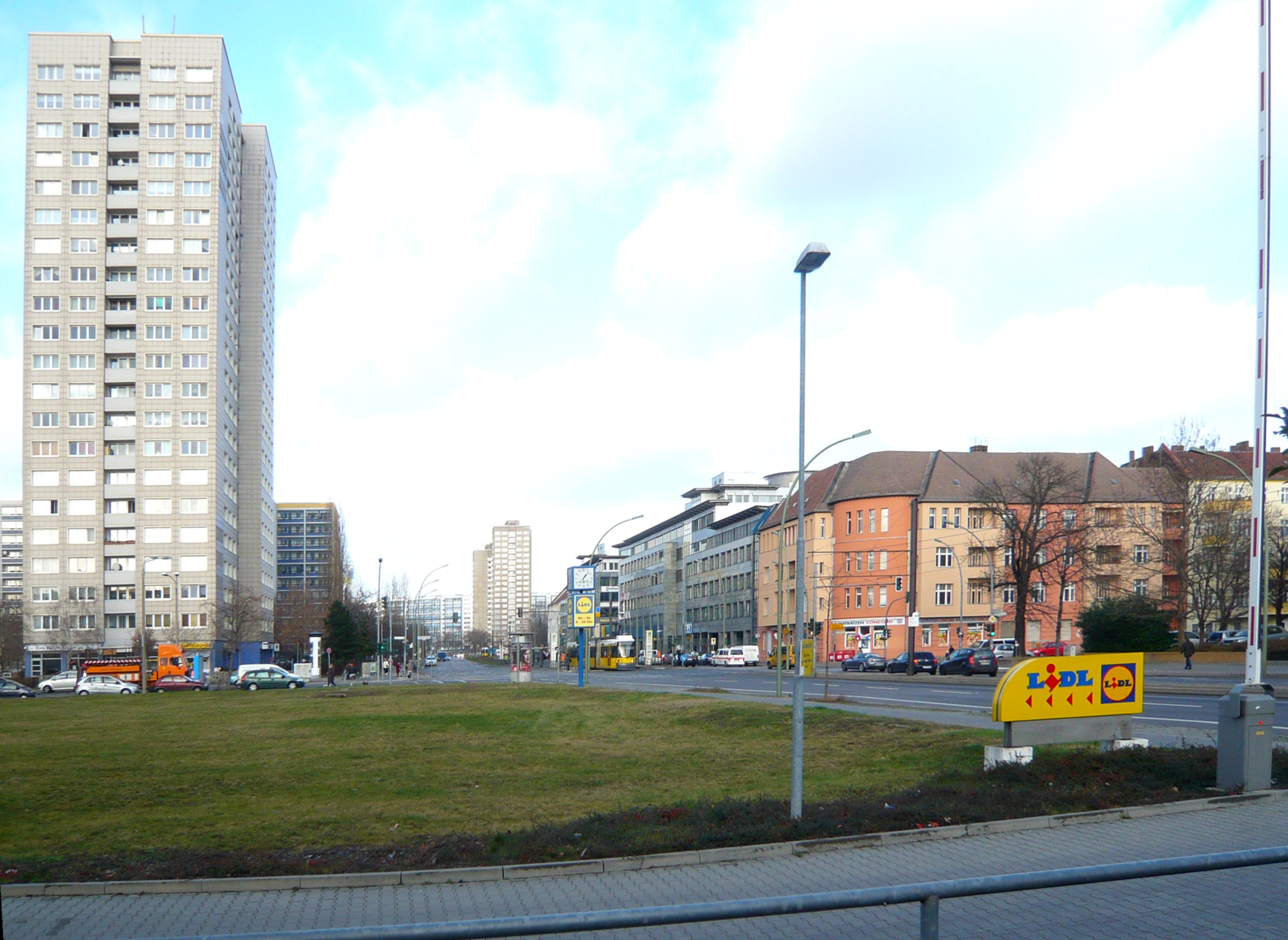 Bezirk Lichtenberg, Möllendorffstraße Blick nordwärts; links Hochhaus Ecke Storkower